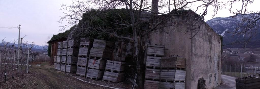 Opera 40 Bolzano